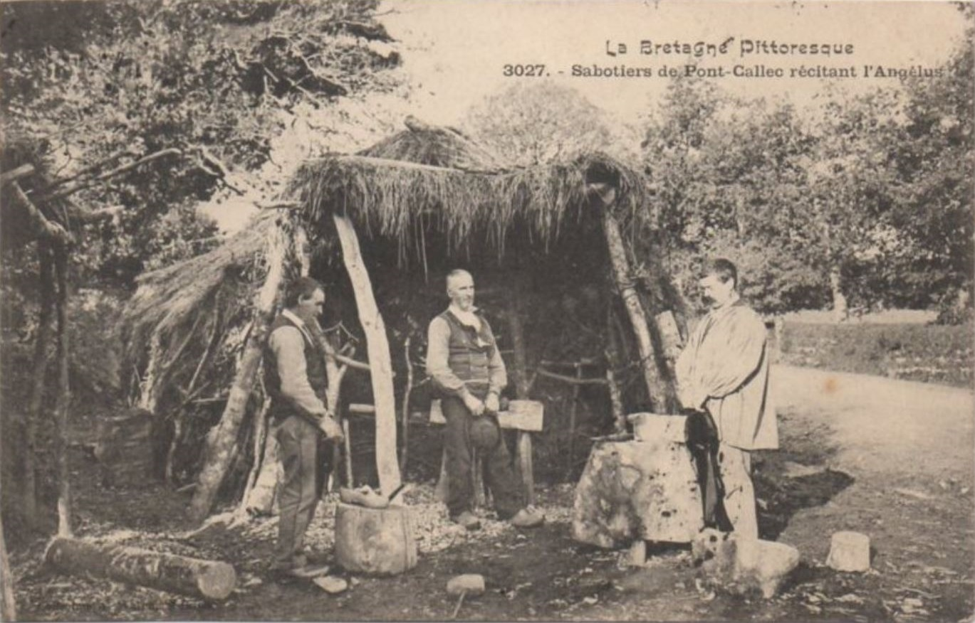 Sabotiers de la forêt de Pontcallec (Berné) récitant l'Angélus (carte postale du début du XXe siècle)